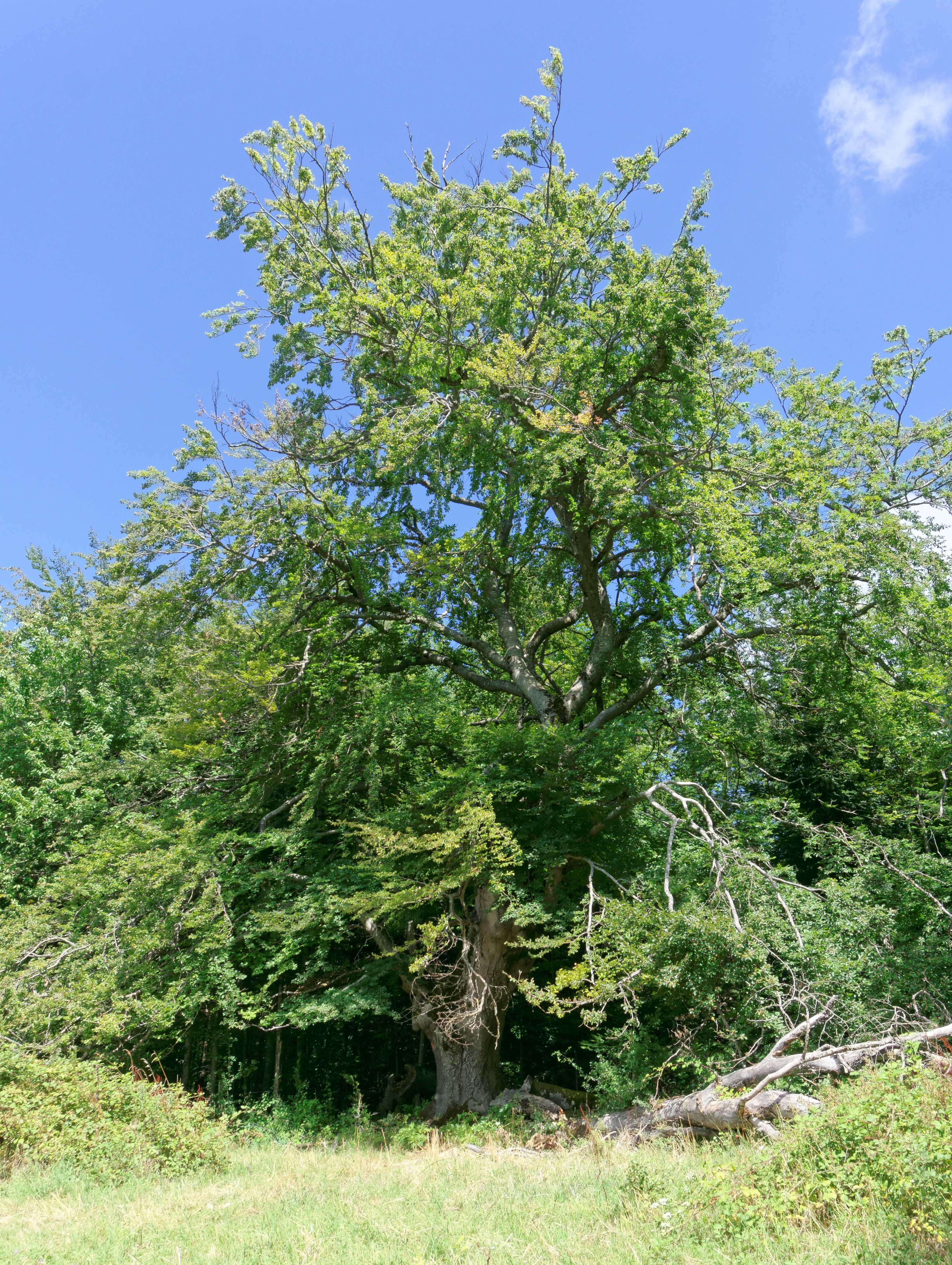 Le hêtre "l'arbre à Mimi" à Treffort,Isère